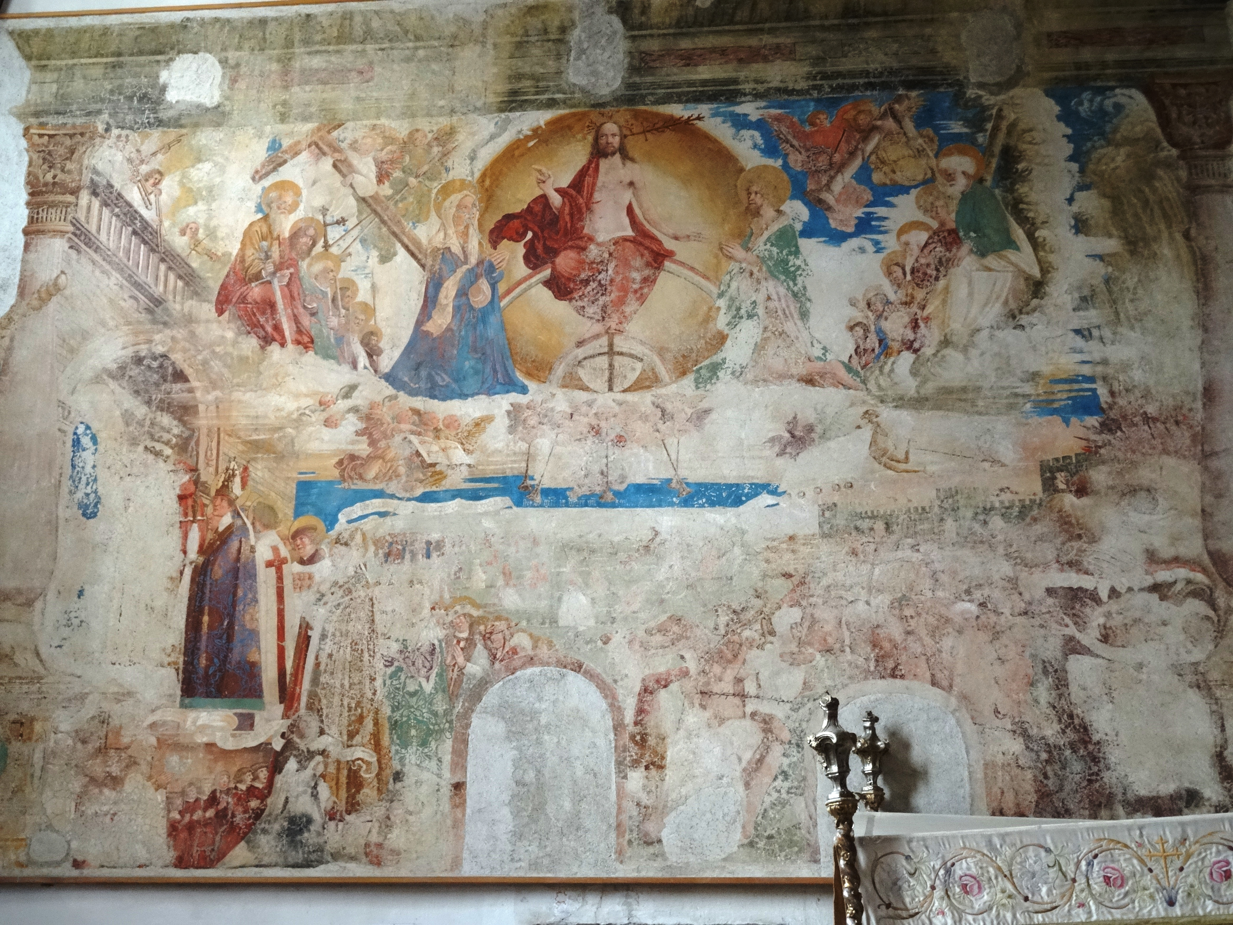 Millstatt am See, Stiftskirche, Weltengericht-Fresko